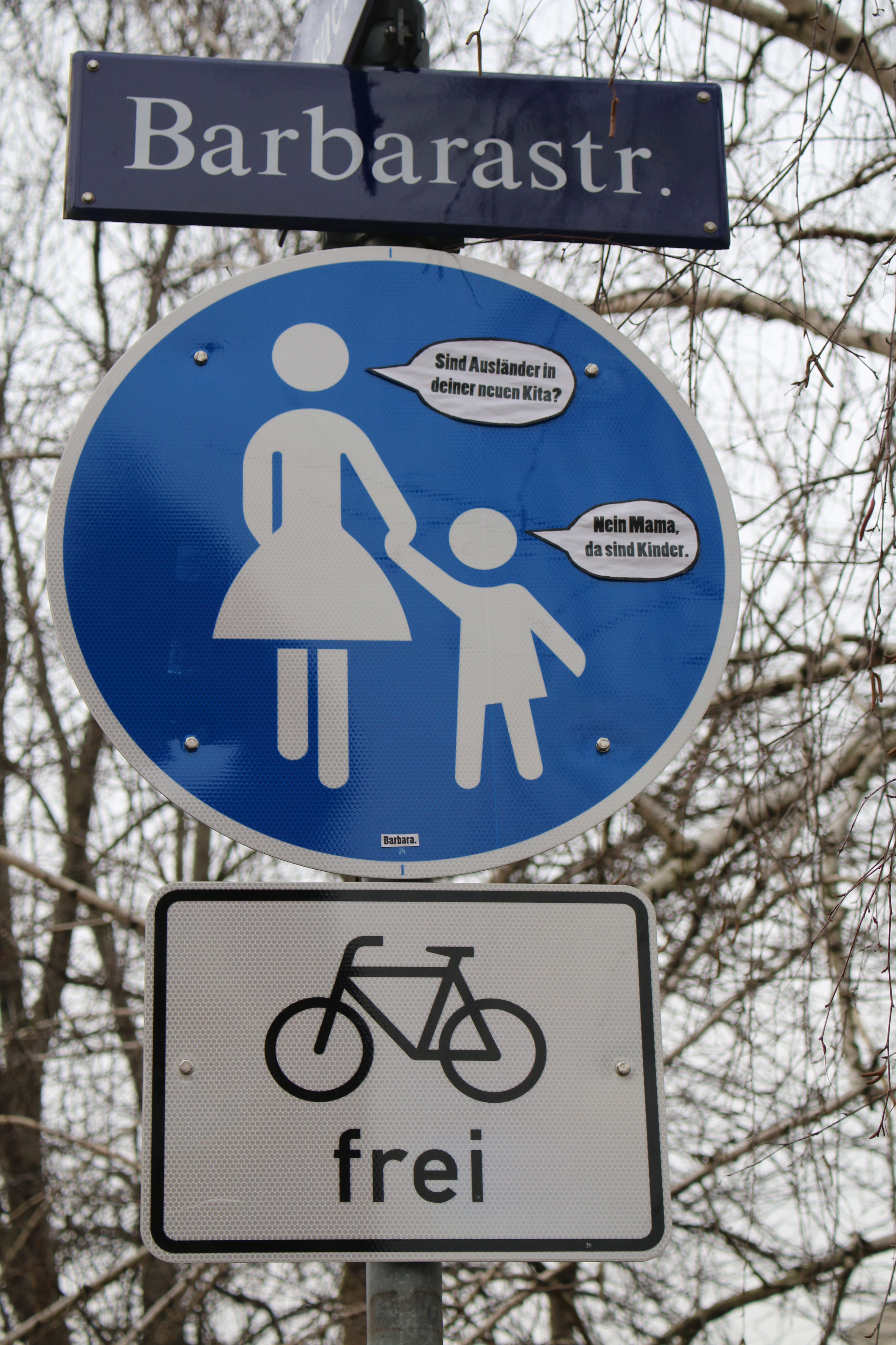 Street-art-Werk von Barbara. an der Barbarastraße zum Geh-/Radweg Riesaer Straße in Dresden-Pieschen